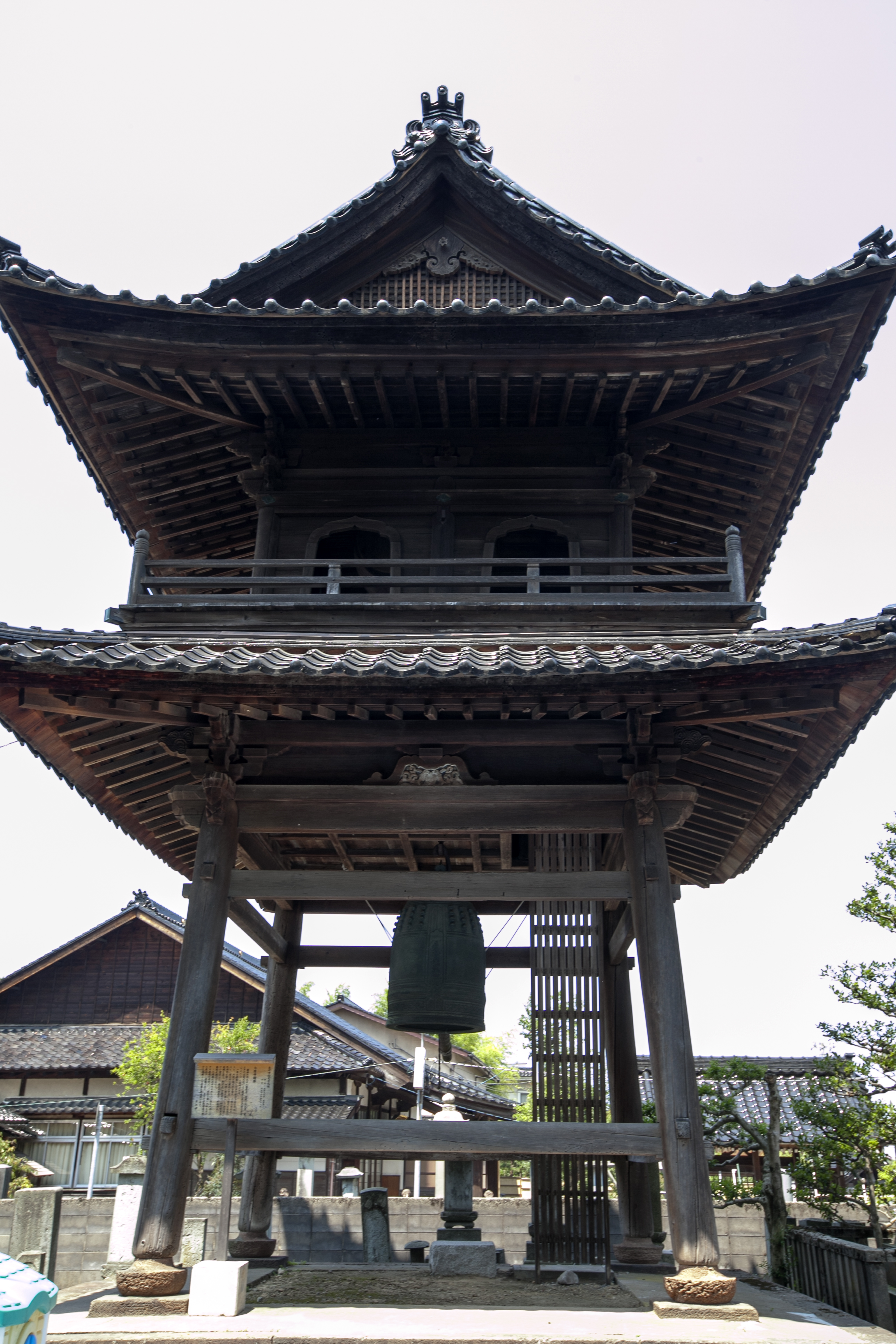 寺町寺院群・立像寺鐘楼